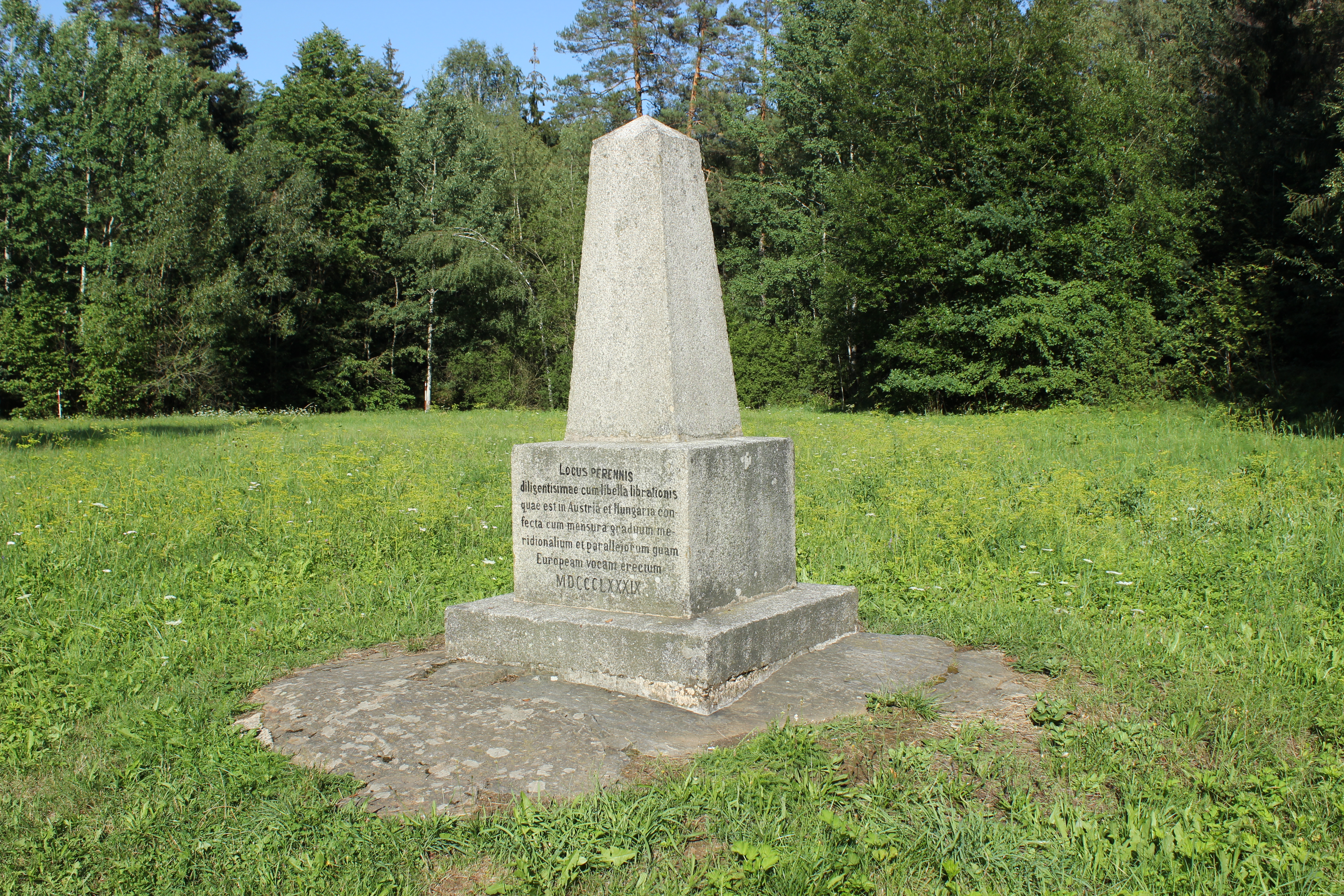 Základní nivelační bod České státní nivelační sítě u Lišova nedaleko Českých Budějovic.